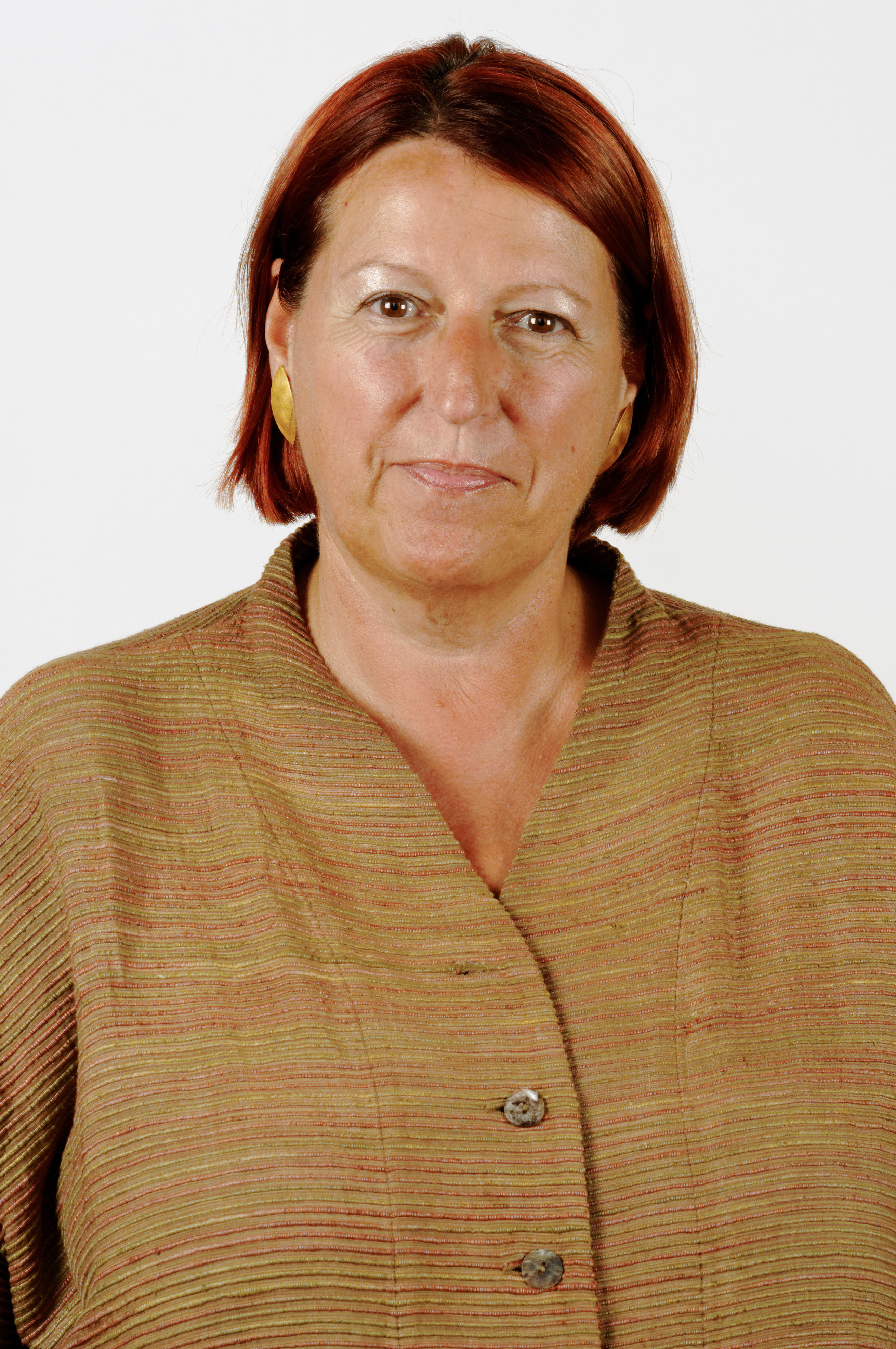 Landtagsprojekt Bayern